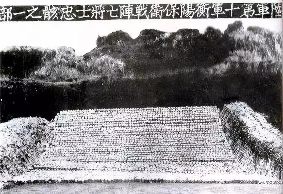 於衡陽保衛戰張家山犧牲之國民革命軍第10軍遺骸之一部，據報約3900餘具，1946年攝